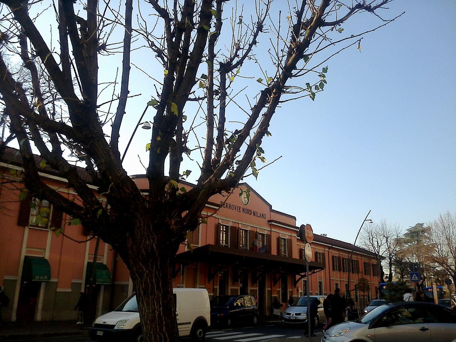 Stazione ferroviaria di Saronno